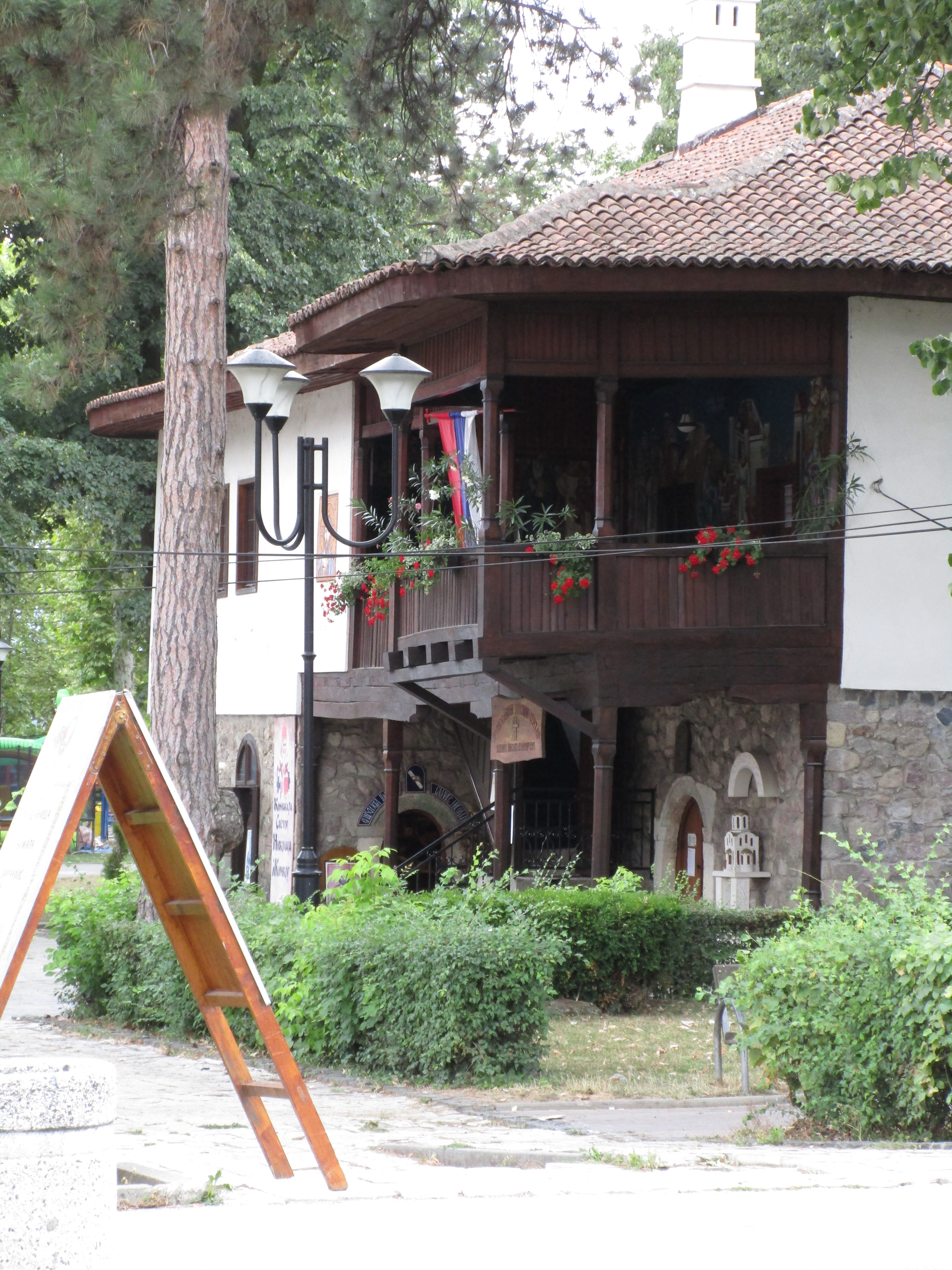 Srpski (latinica): Edu viki kamp 2017, foto tura u Kraljevu